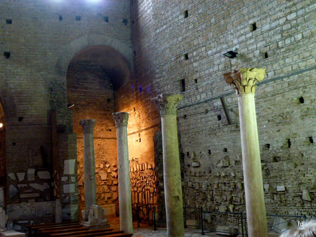 Domitilla Katakombe Basilika